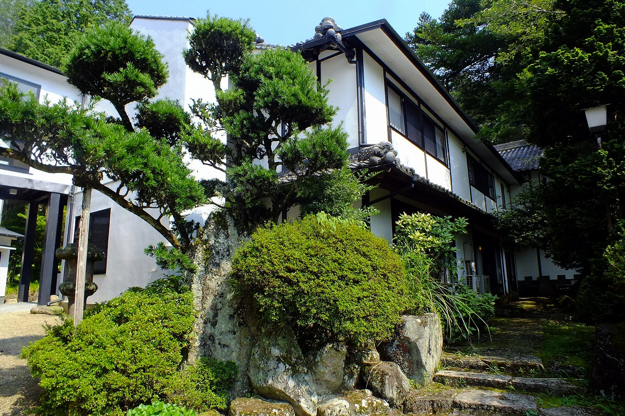 2015-10-01 Sioda-Onsen Ueyama Ryokan（湯元上山旅館）